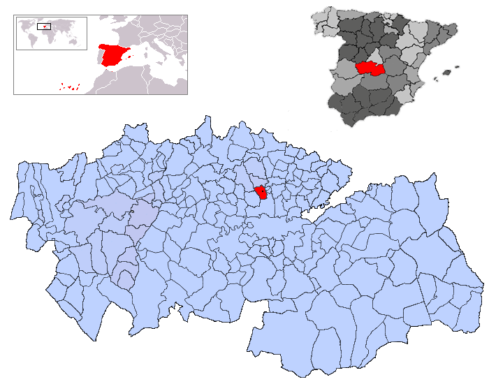 Camarenilla en la provincia de Toledo